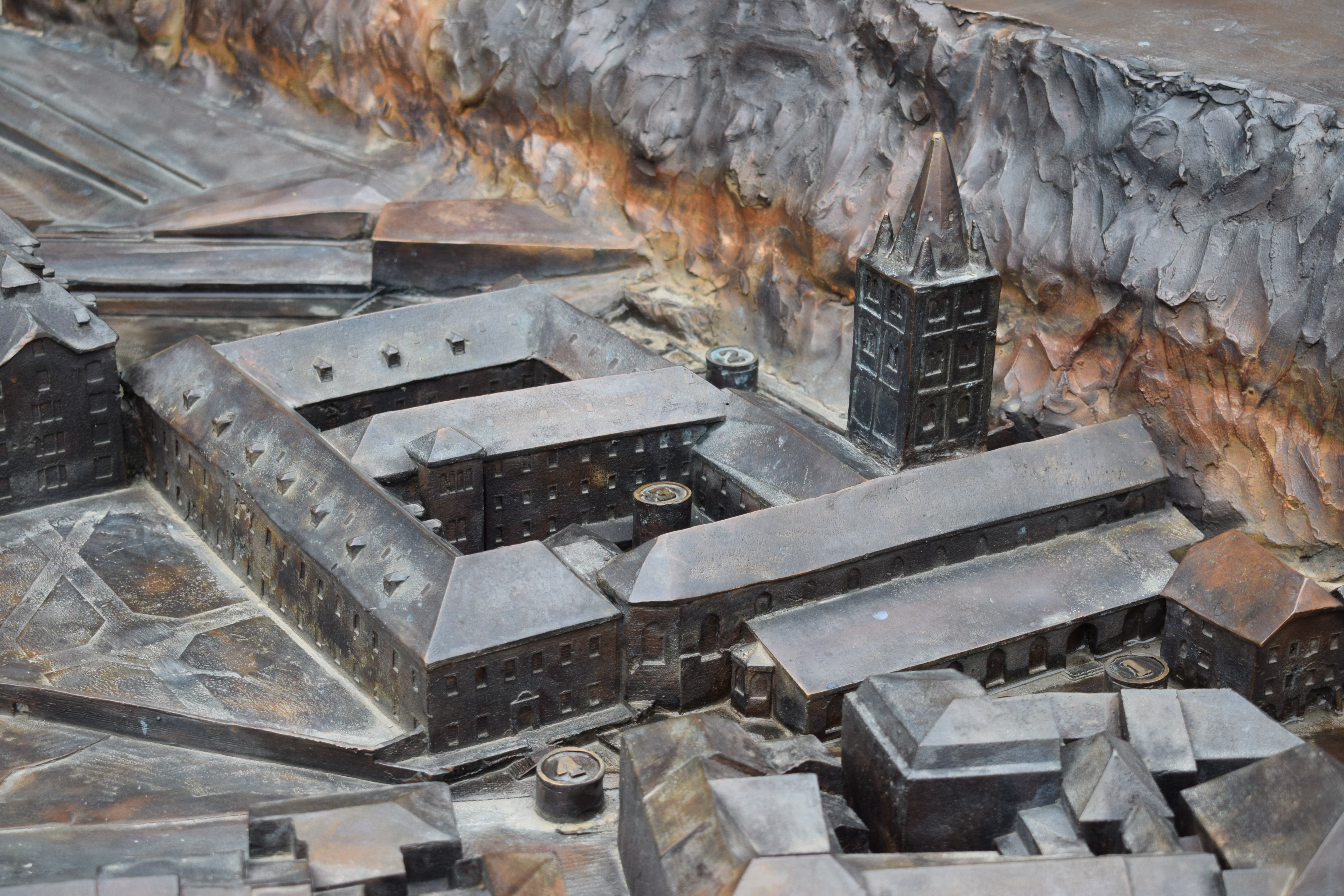 Vue de l'abbaye de Saint-Maurice, dans le canton du Valais (Suisse).